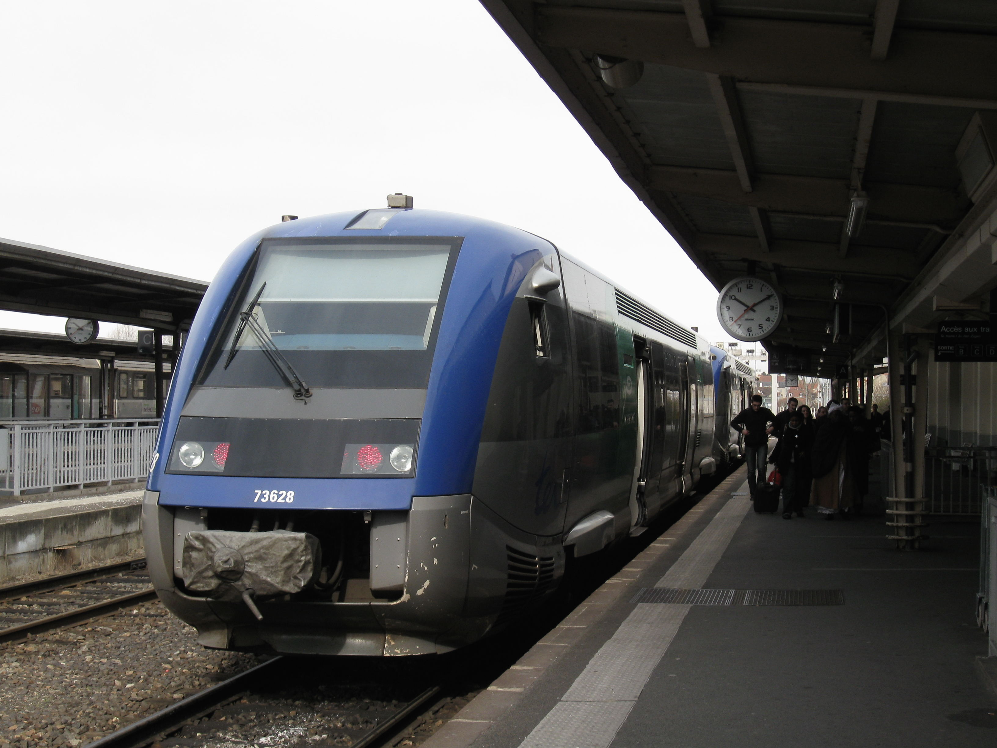 Rame TER Vierzon - Montluçon à son terminus en gare de Montluçon-Ville, Montluçon, Allier, France